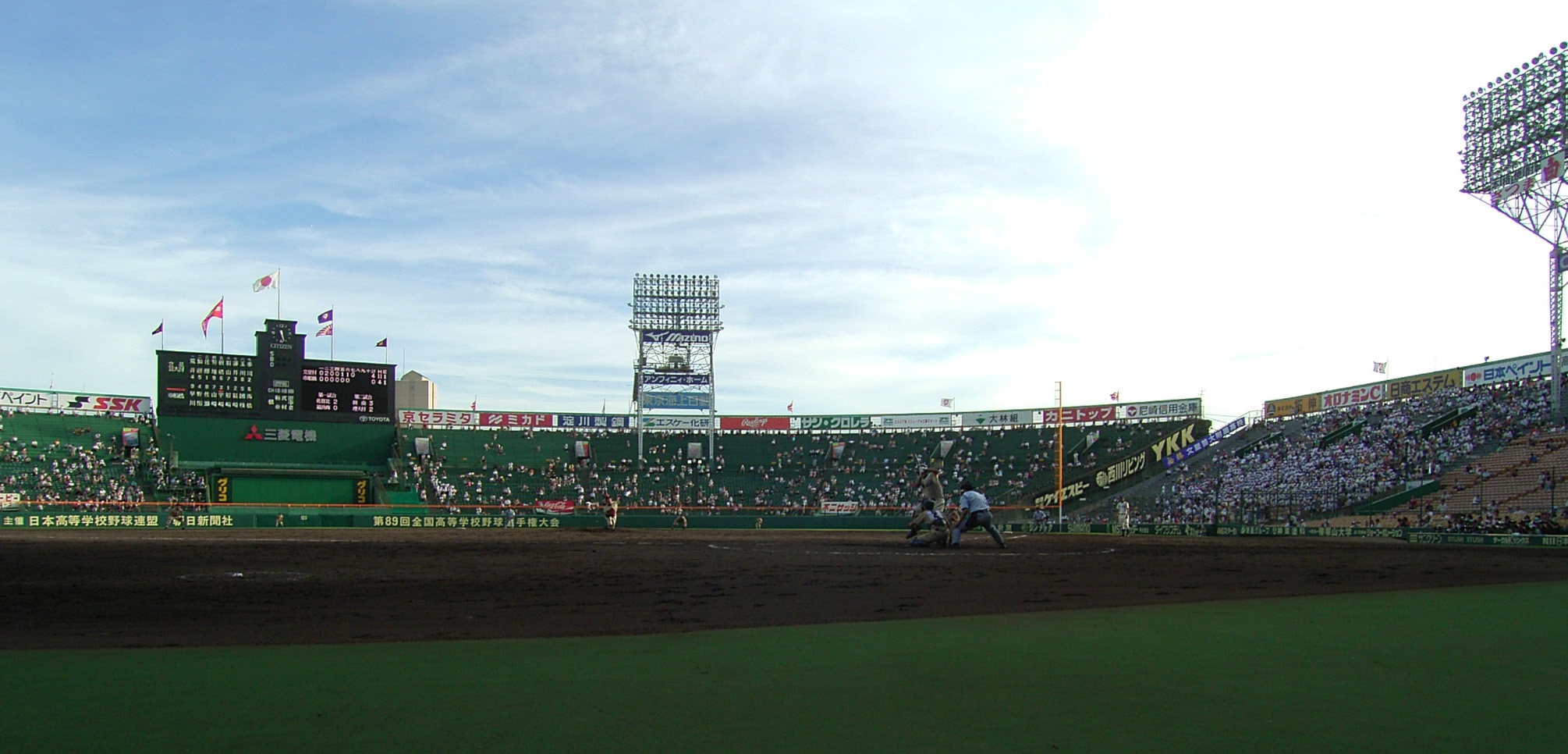 Hanshin Koshien Stadium